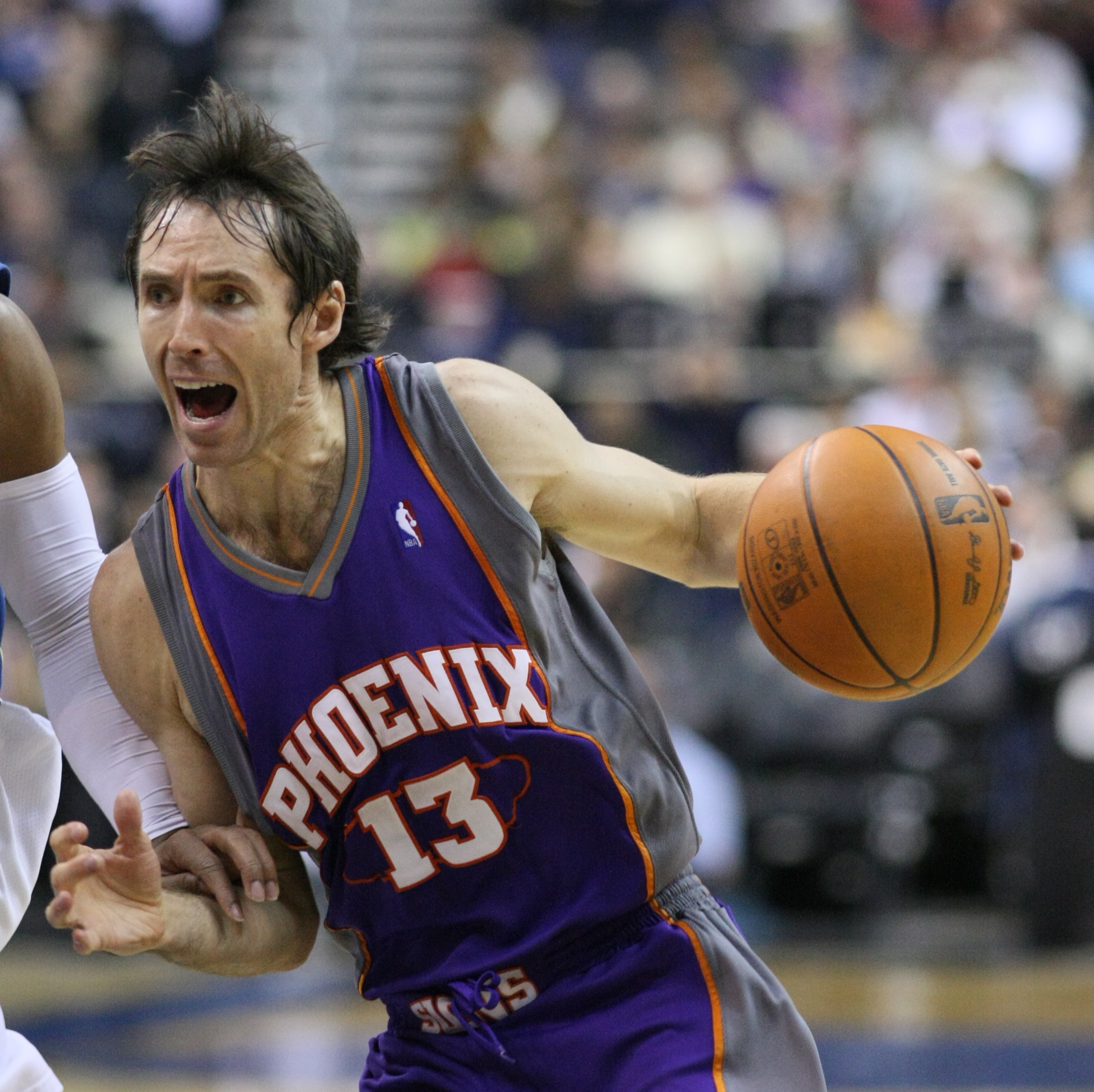 El jugador canadiense de baloncesto Steve Nash.